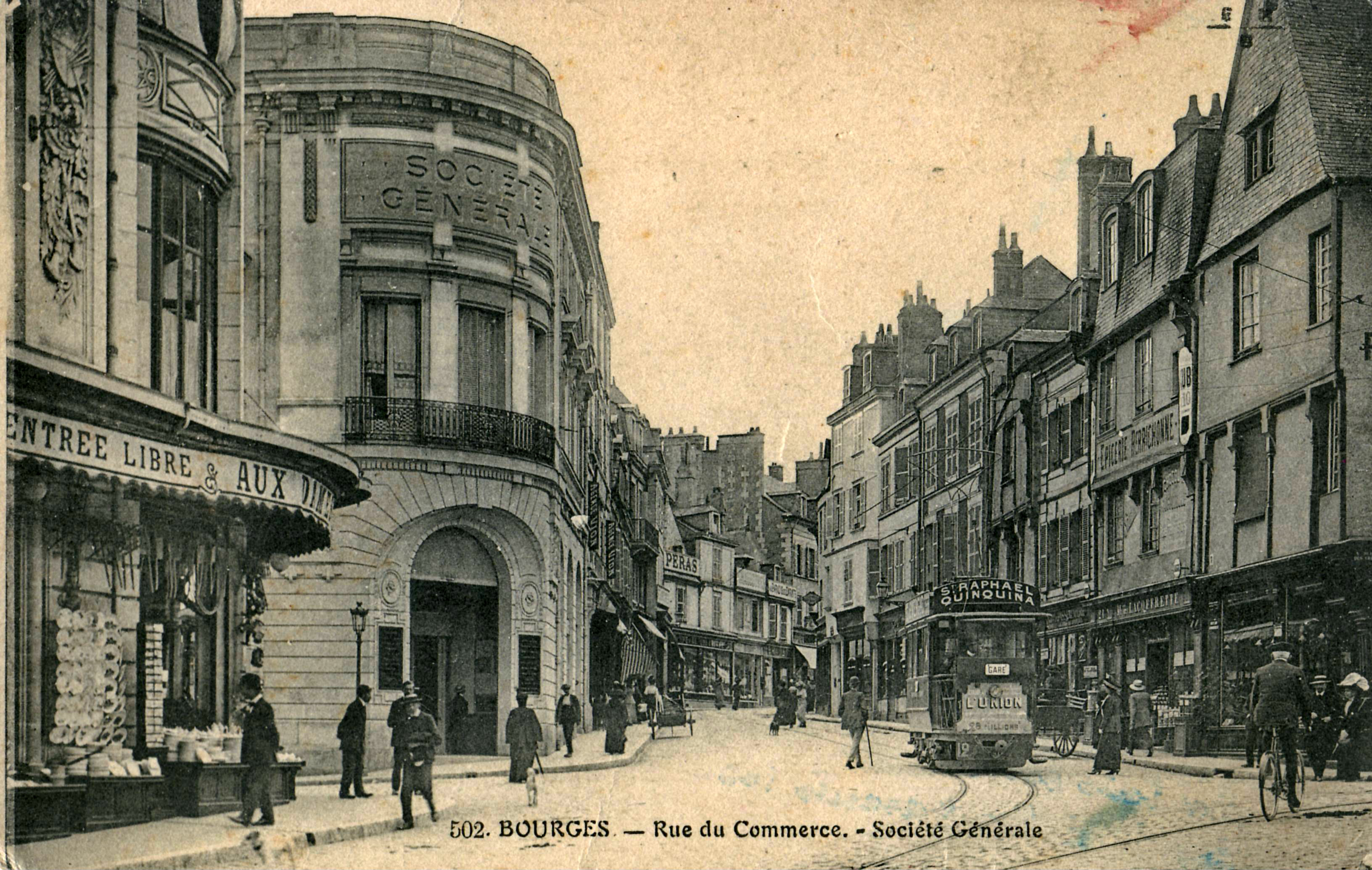 Carte postale ancienne éditée par Maquaire n°502 : BOURGES - Rue du Commerce - Société Générale